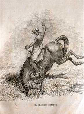 El llanero domador Llanos venezolanos 1892 dibujo de Celestino Martínez, litografiado por Celestino y Jerónimo Martínez litografía 22 x 23 cm Publicado en: El Cojo Ilustrado, año I, No. 1, Caracas, 1 enero 1892, p. 1